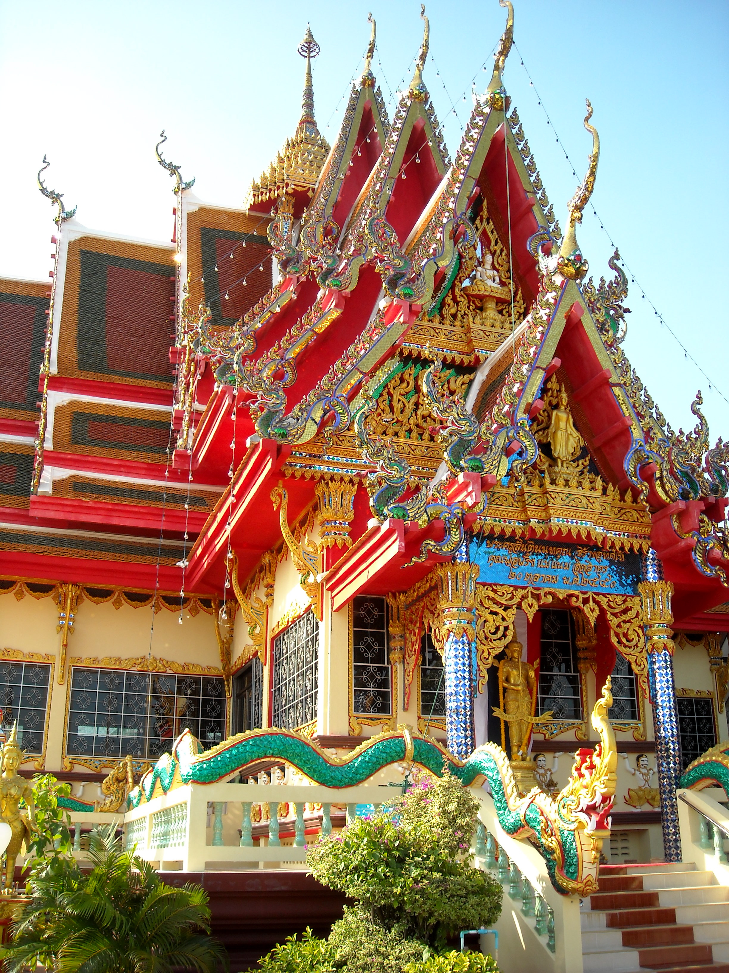 Wat Plai Laem, Ko Samui, Surat Thani